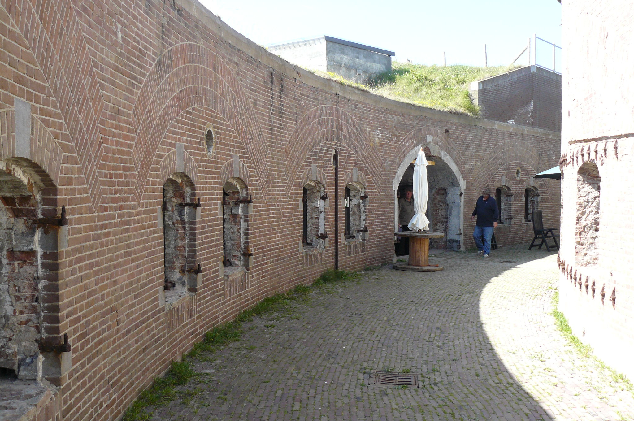 Een deel van de droge gracht is uitgegraven, maar het grootste deel ligt nog onder de grond. Links liggen de verblijven voor de officieren en de manschappen in de contrescarpgalerij en rechts het hoofdgebouw met de ruimten voor de munitie en de kanonnen.